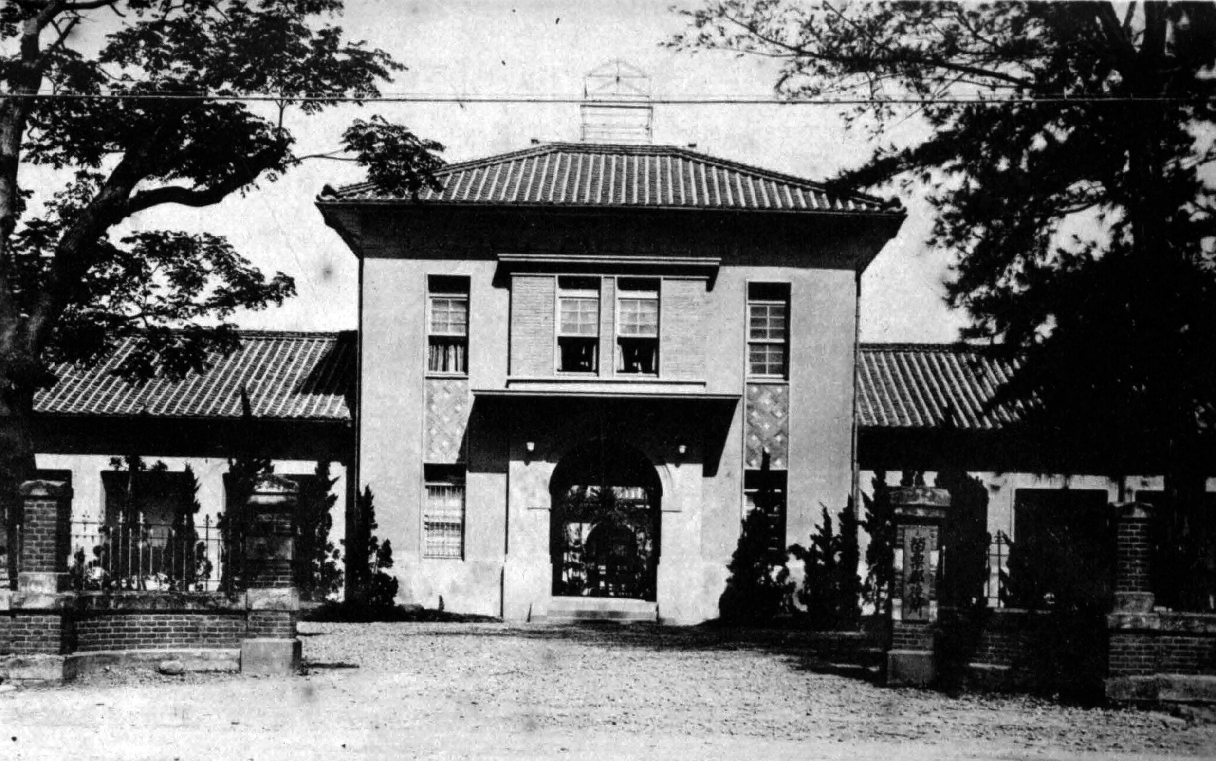 中文（台灣）: 苗栗郡役所